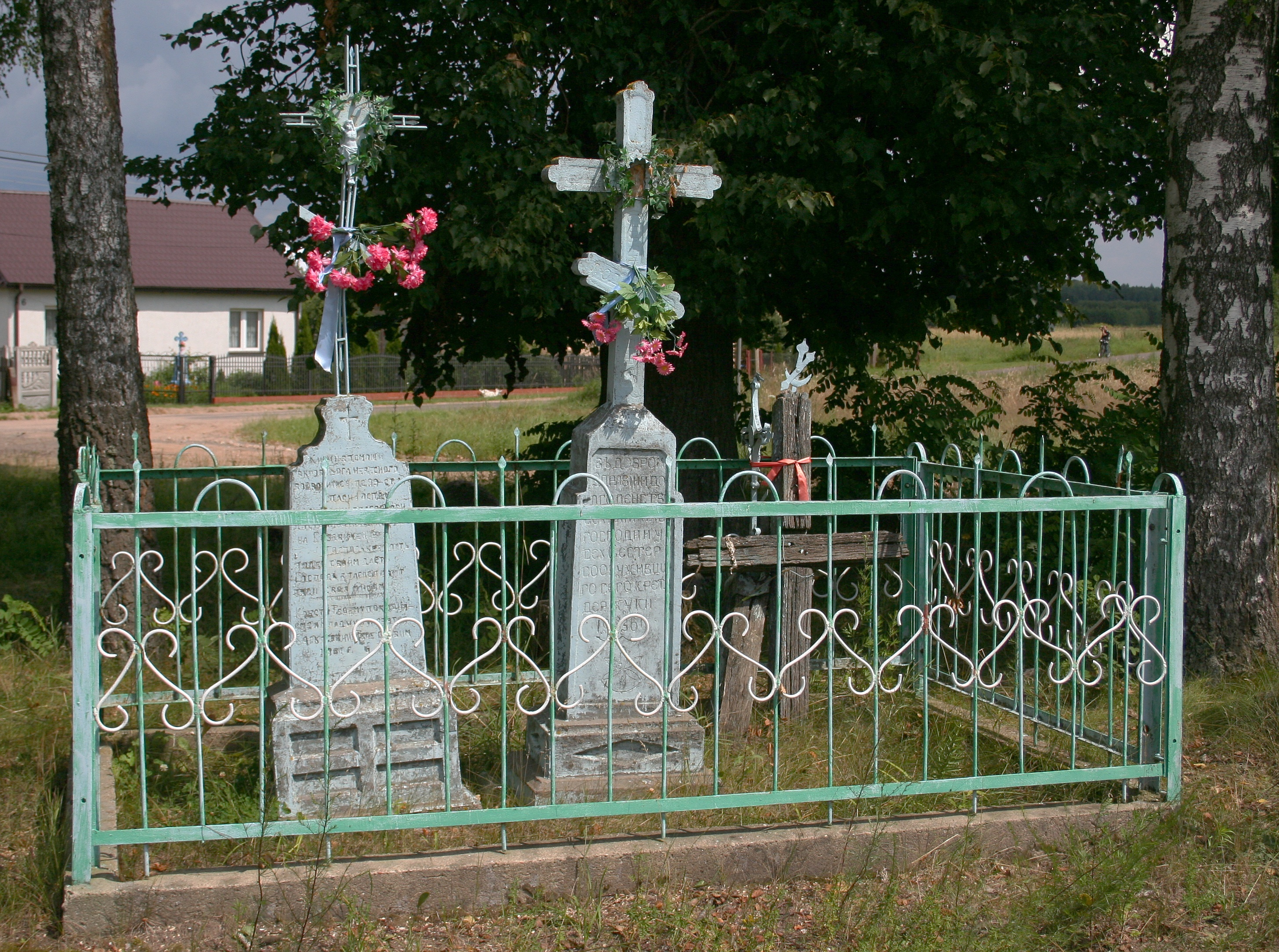 Krzyże w miejscowości Żuki, gmina Kleszczele, woj. podlaskie